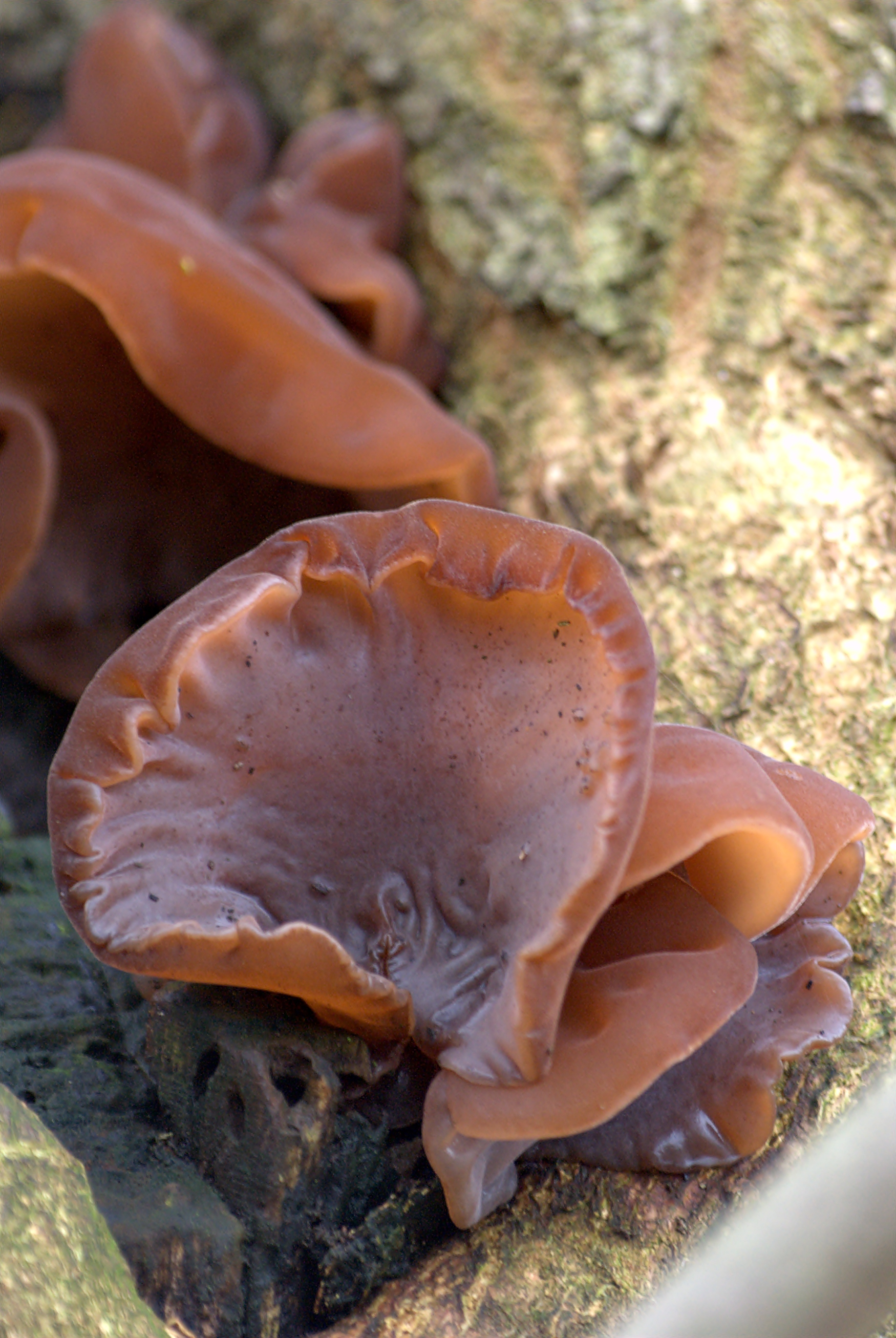 Name: Auricularia auricula-judae Family: Auriculariaceae. Location: Münster, NRW, Germany